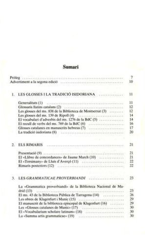 Llibres